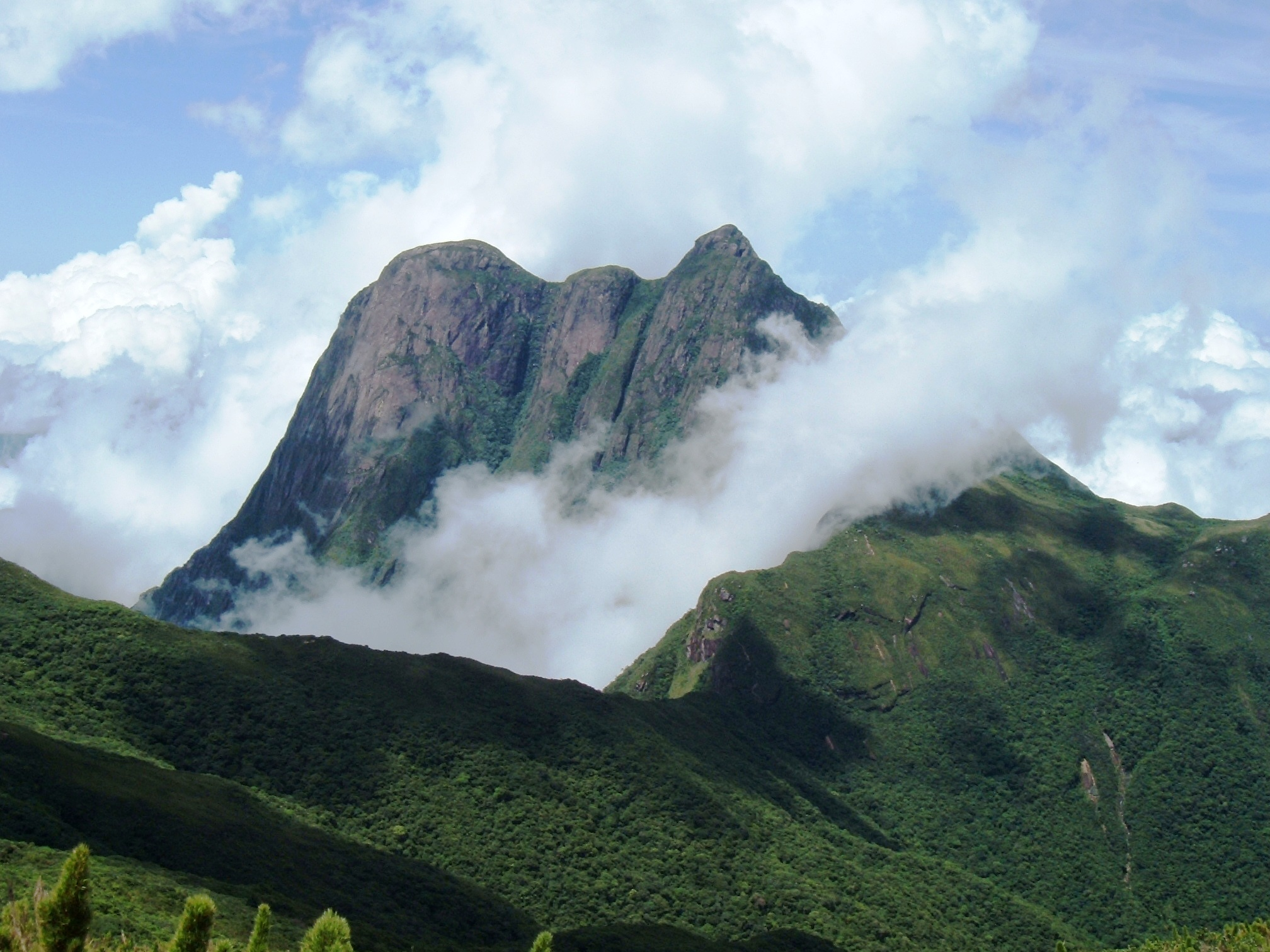 Vista do Conjunto do Pico Paraná a partir do cume do Itapiroca.